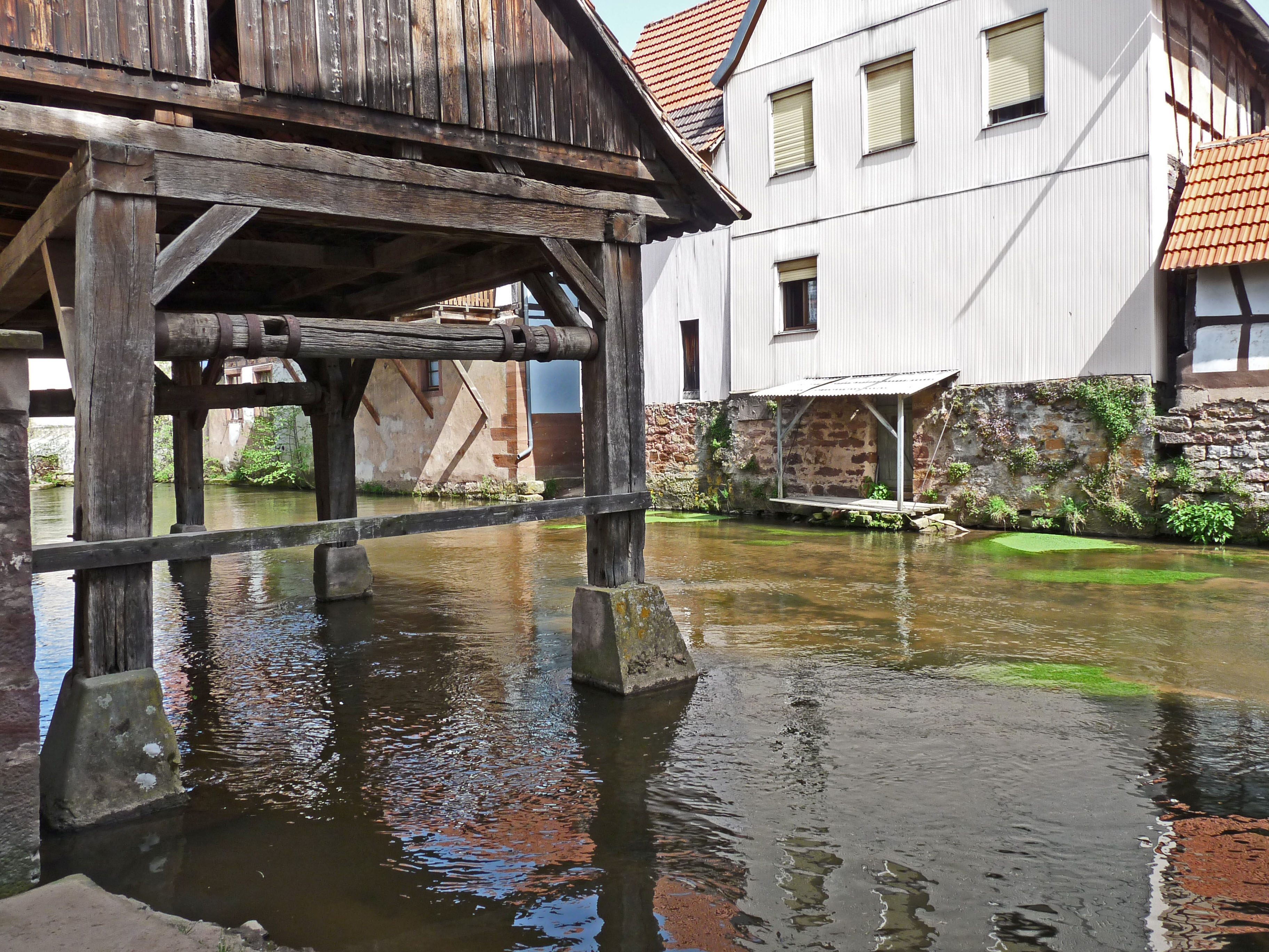 Lavoir sur la Sauer, affluent du Rhin, à Woerth (Bas-Rhin).